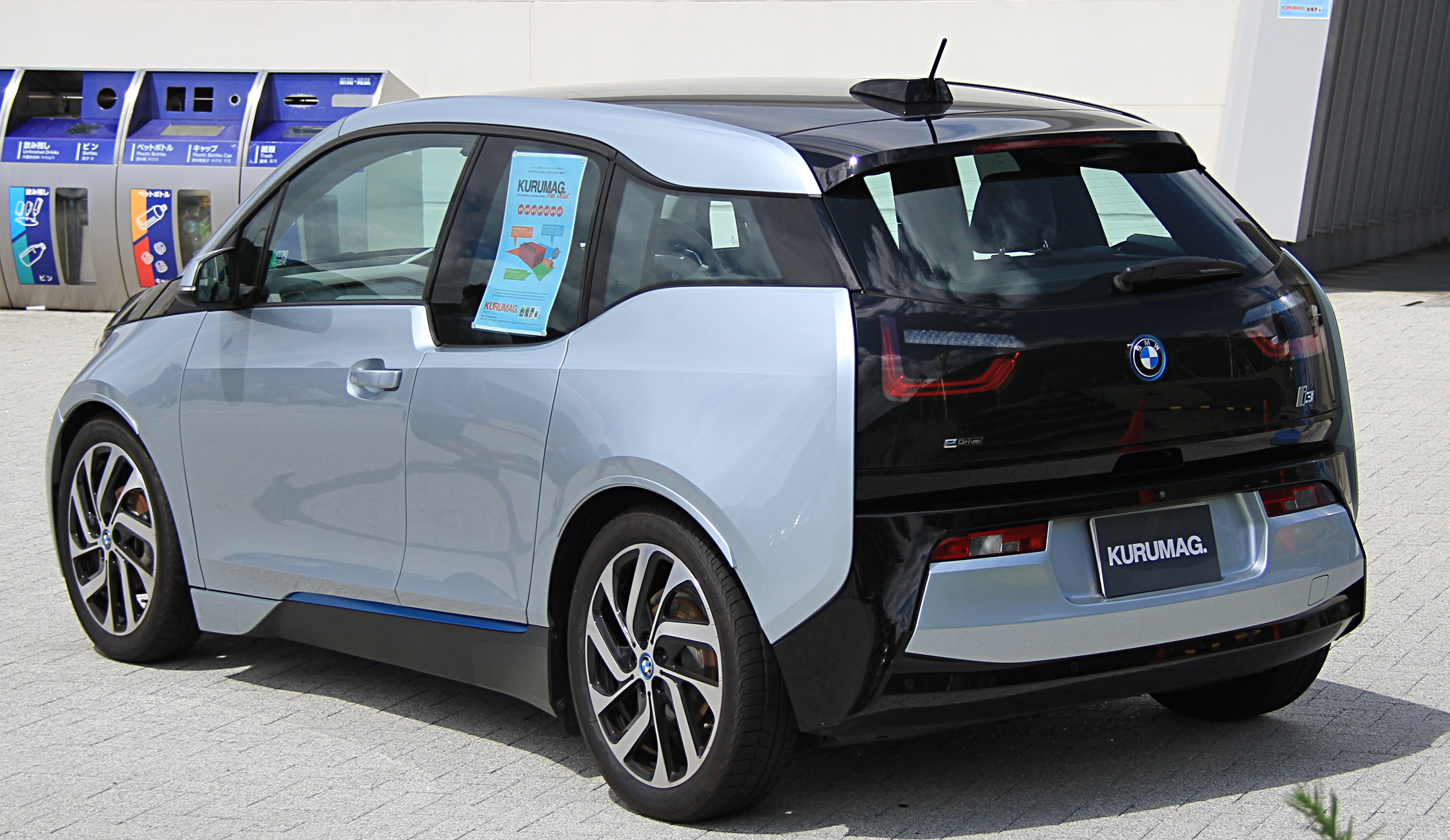 BMW i3